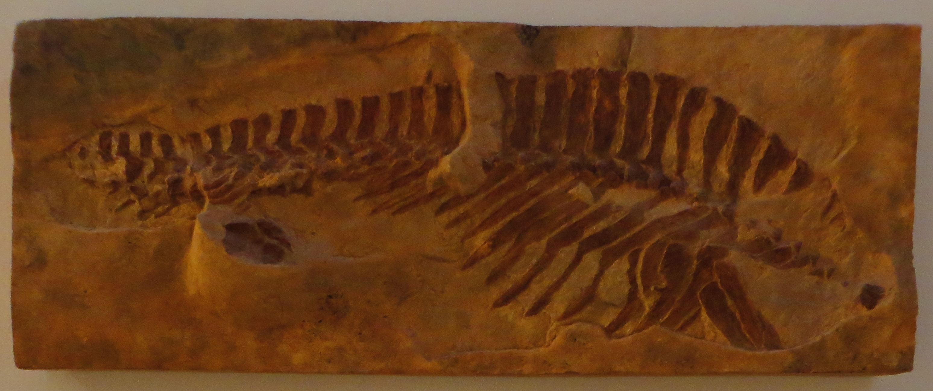 Fossil of Sclerothorax, an extinct amphibian- Took the picture at Museum of Paleontology, Tuebingen